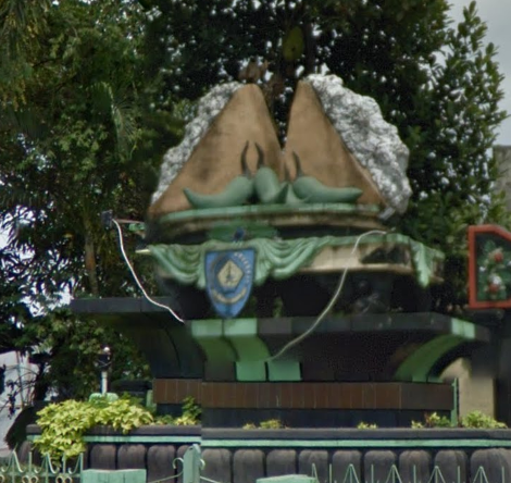 Patung Tahu Aci